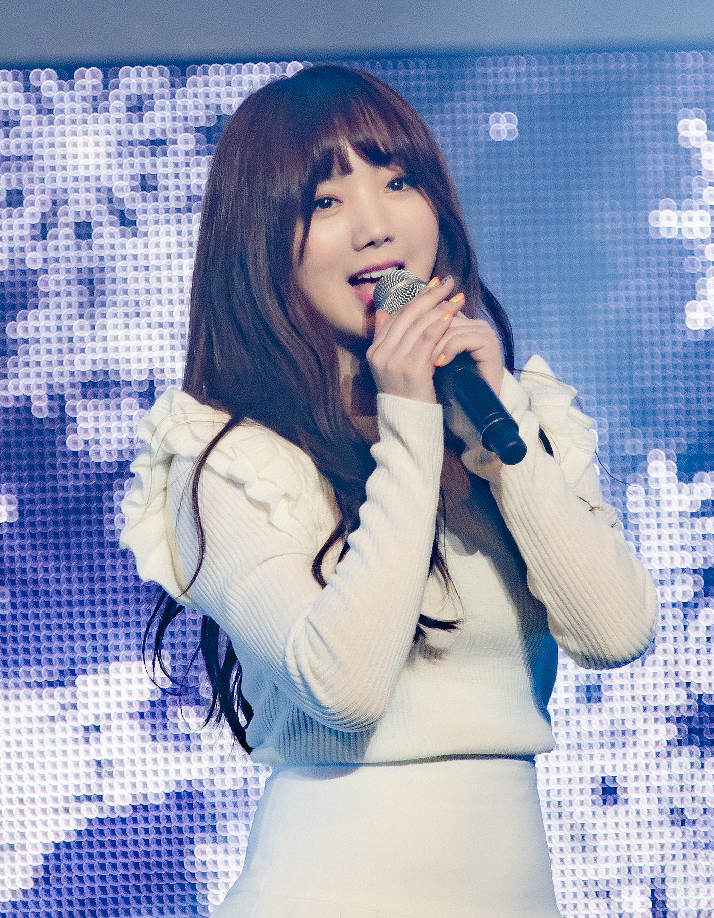 170114 겨울 나라의 러블리즈 케이